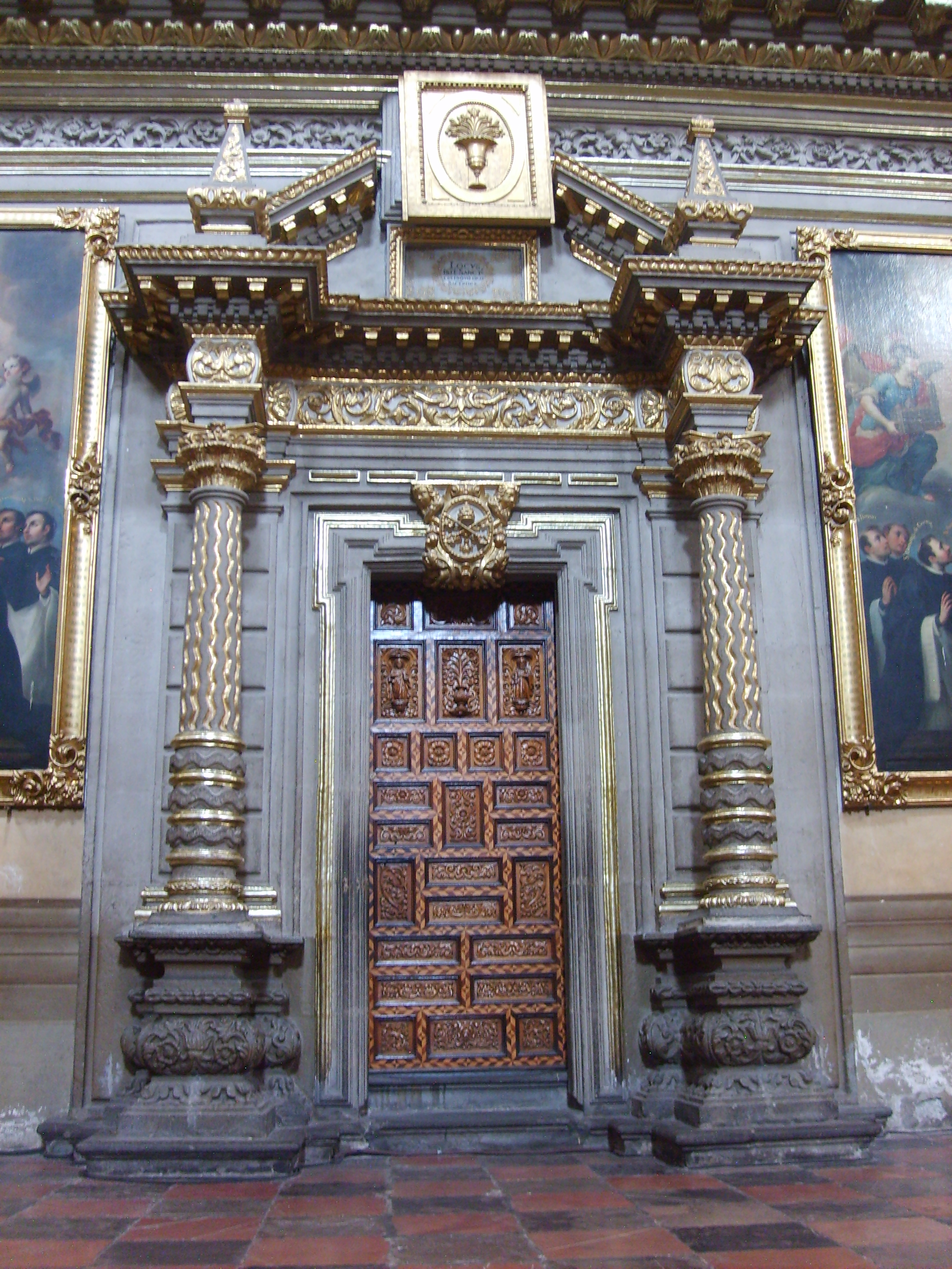 Puerta de acceso al Coro de la Catedral de Puebla — Baroque en México.